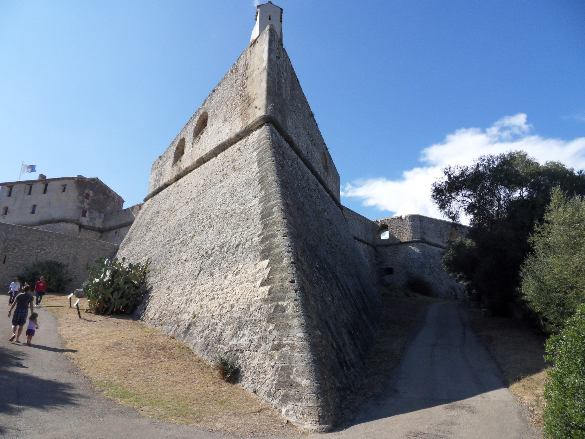 Antibes- Pointe sud-est du Fort carré